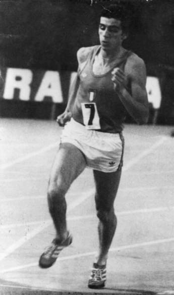 Carlo Grippo in azione in una gara iin Italia degli anni settanta